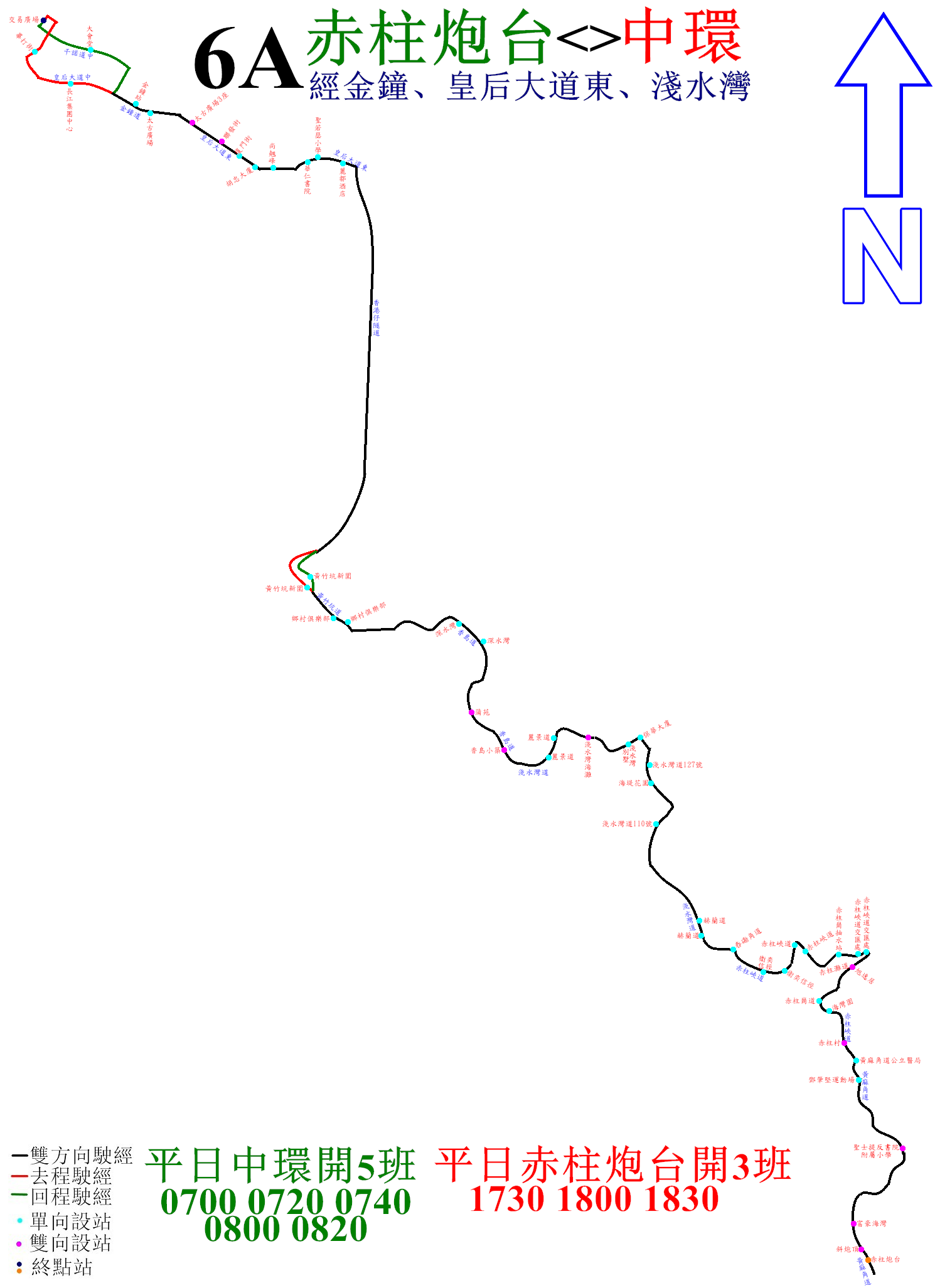 中文（香港）: 城巴6A線的走線圖